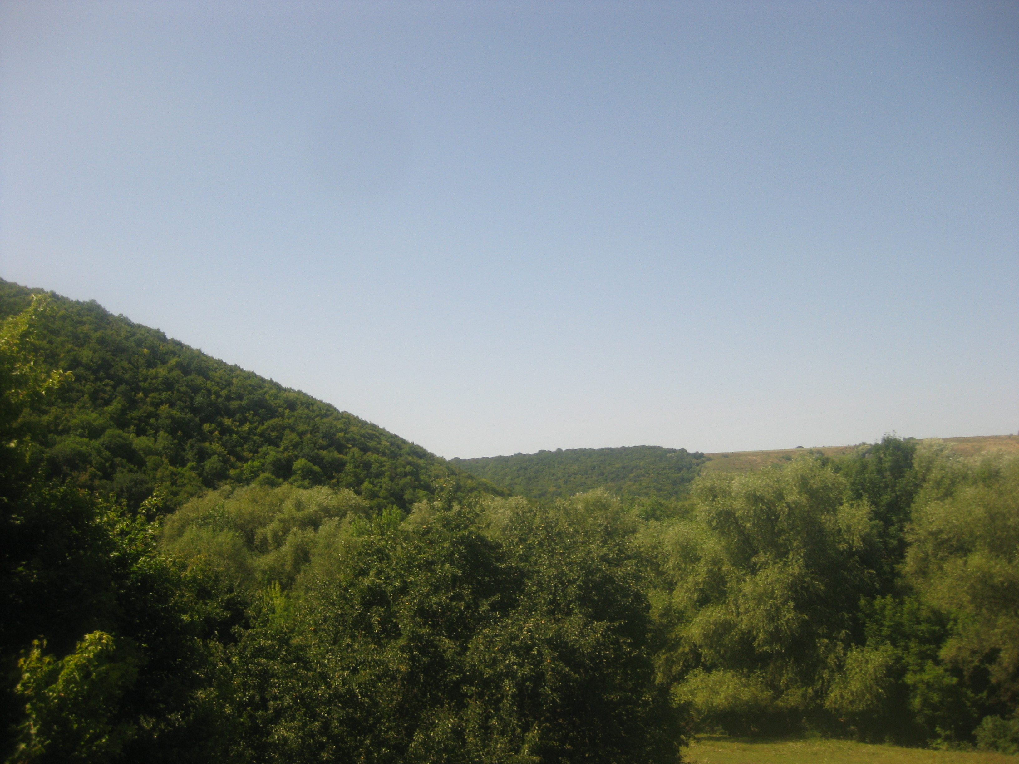 Отроківський, Новоушицький район, Центральна частина с. Отроків